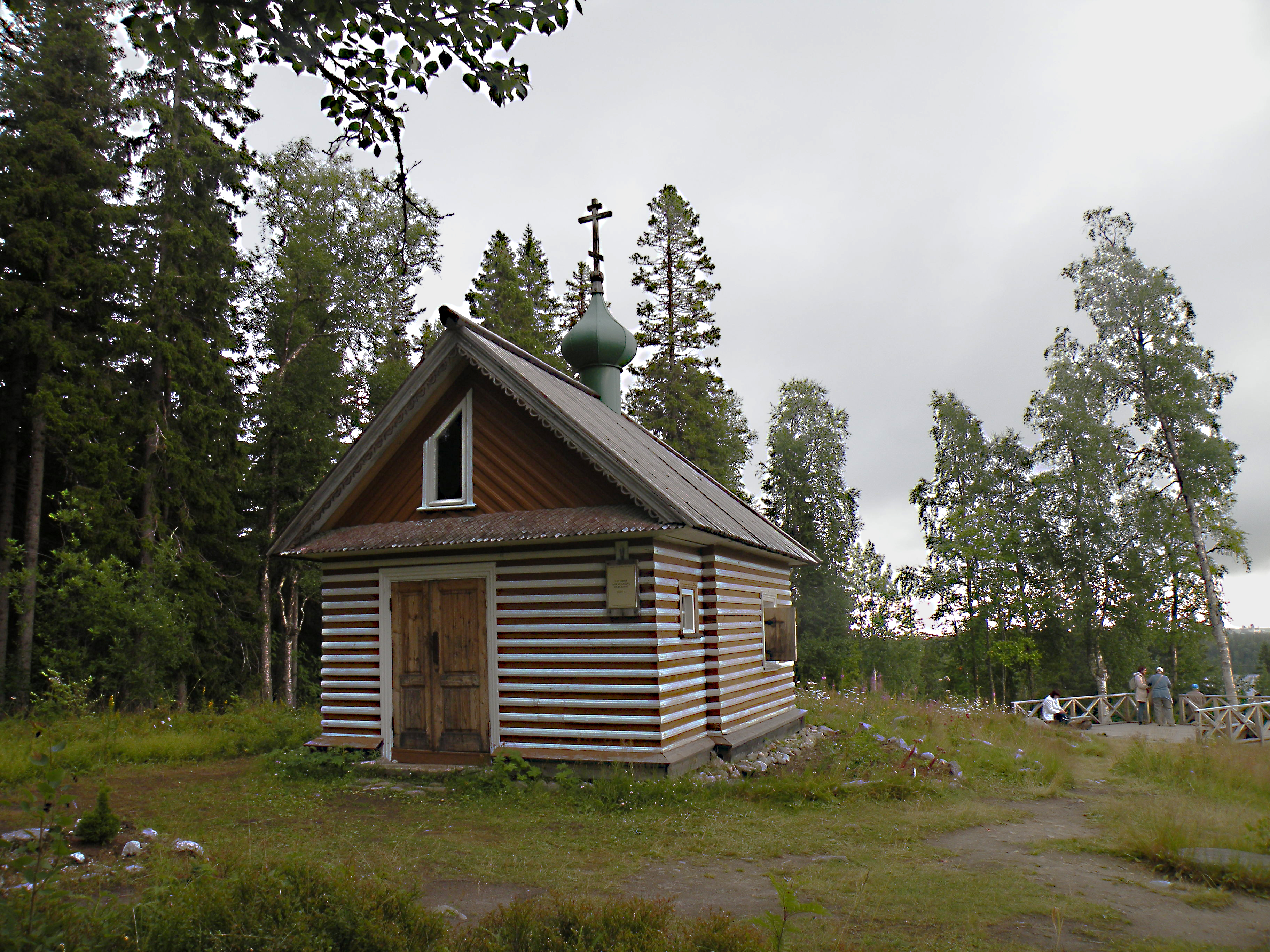 Большой Соловецкий остров. Часовня Александра Невского. Построена после отражения нападения англо-французской эскадры в 1854 году.